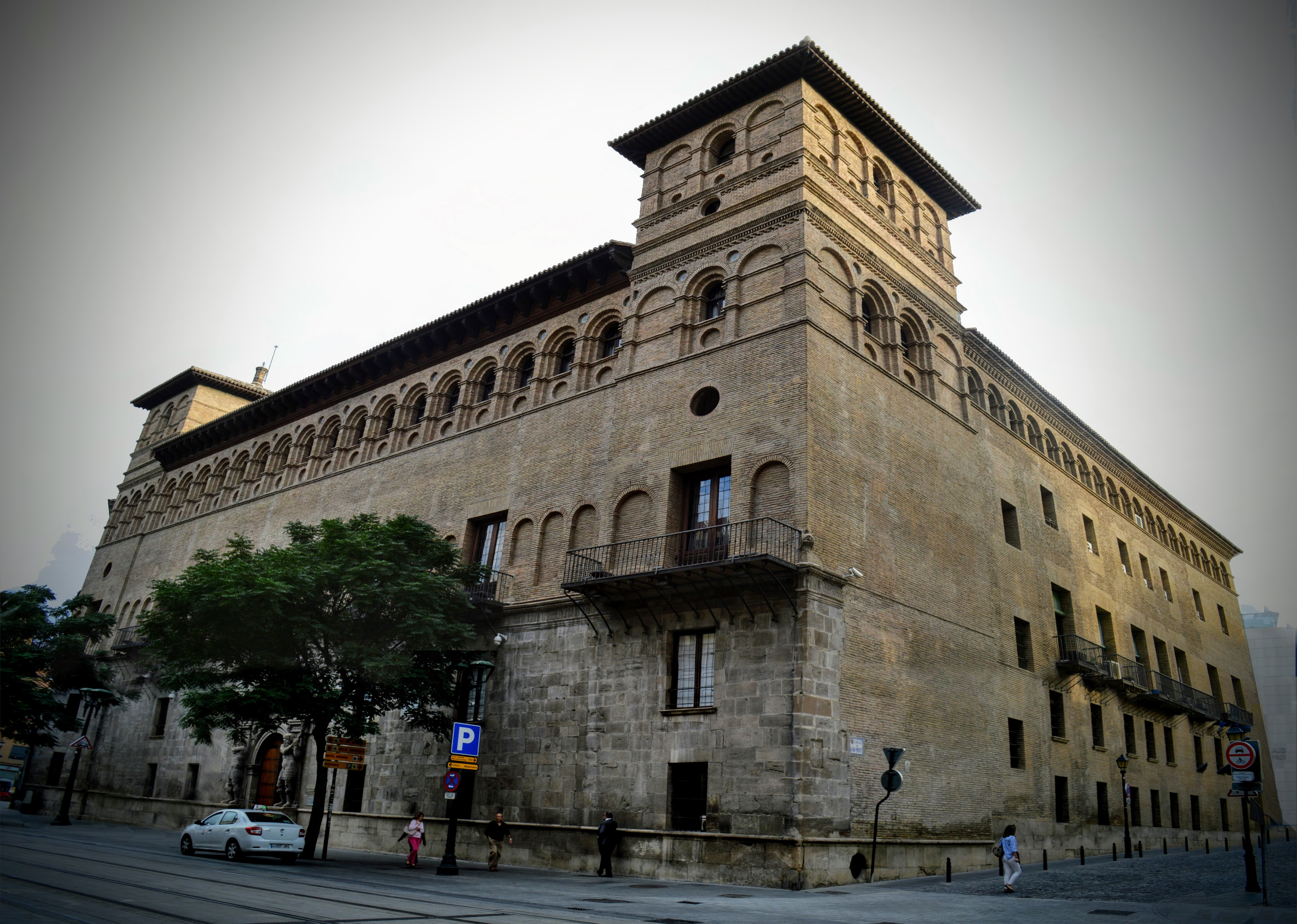 Esta fotografía consigue una perspectiva completa del Palacio de los Luna, sede en la actualidad del Tribunal Superior de Justicia de Aragón y de la Audiencia Provincial de Zaragoza